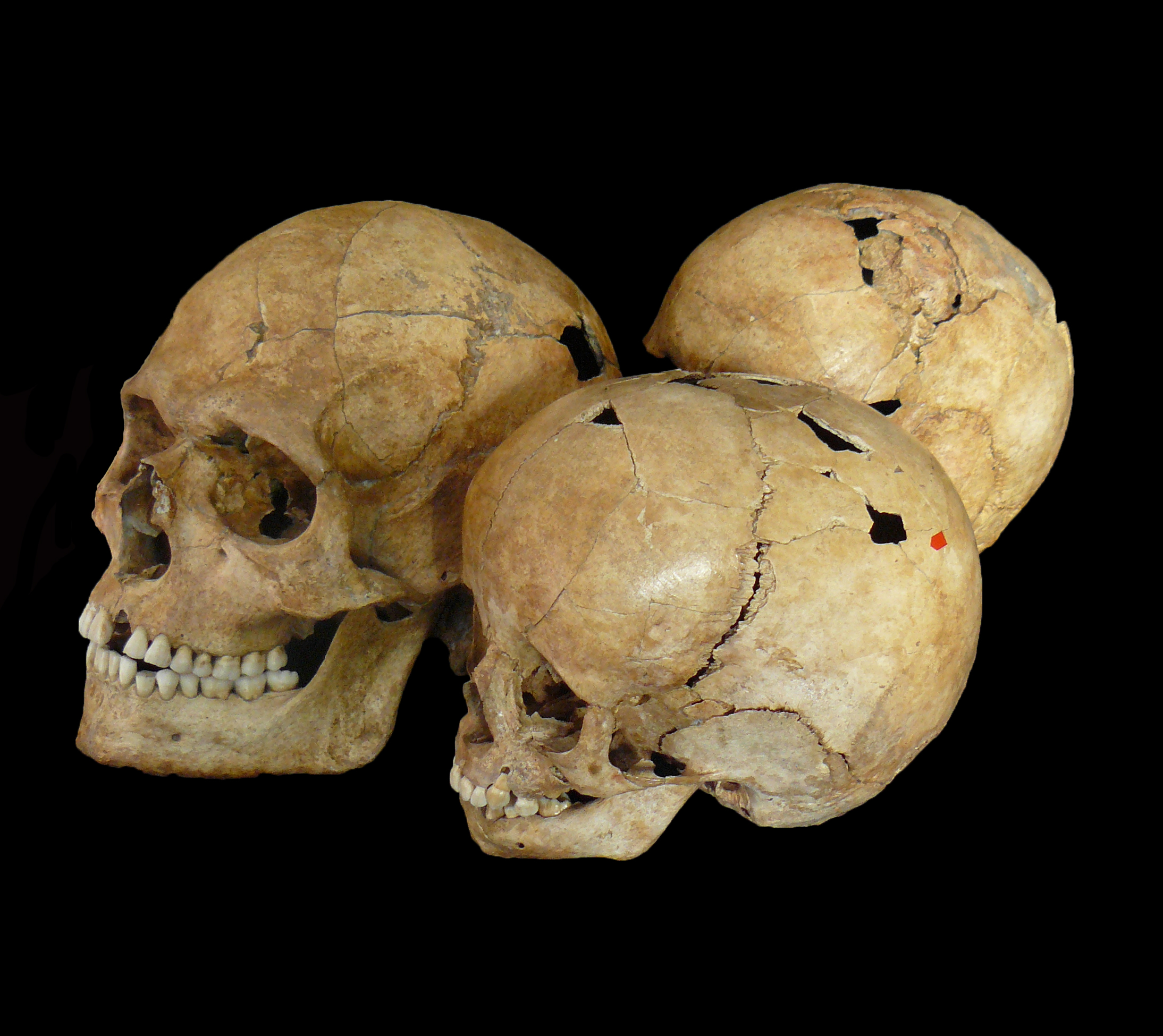 Stadel